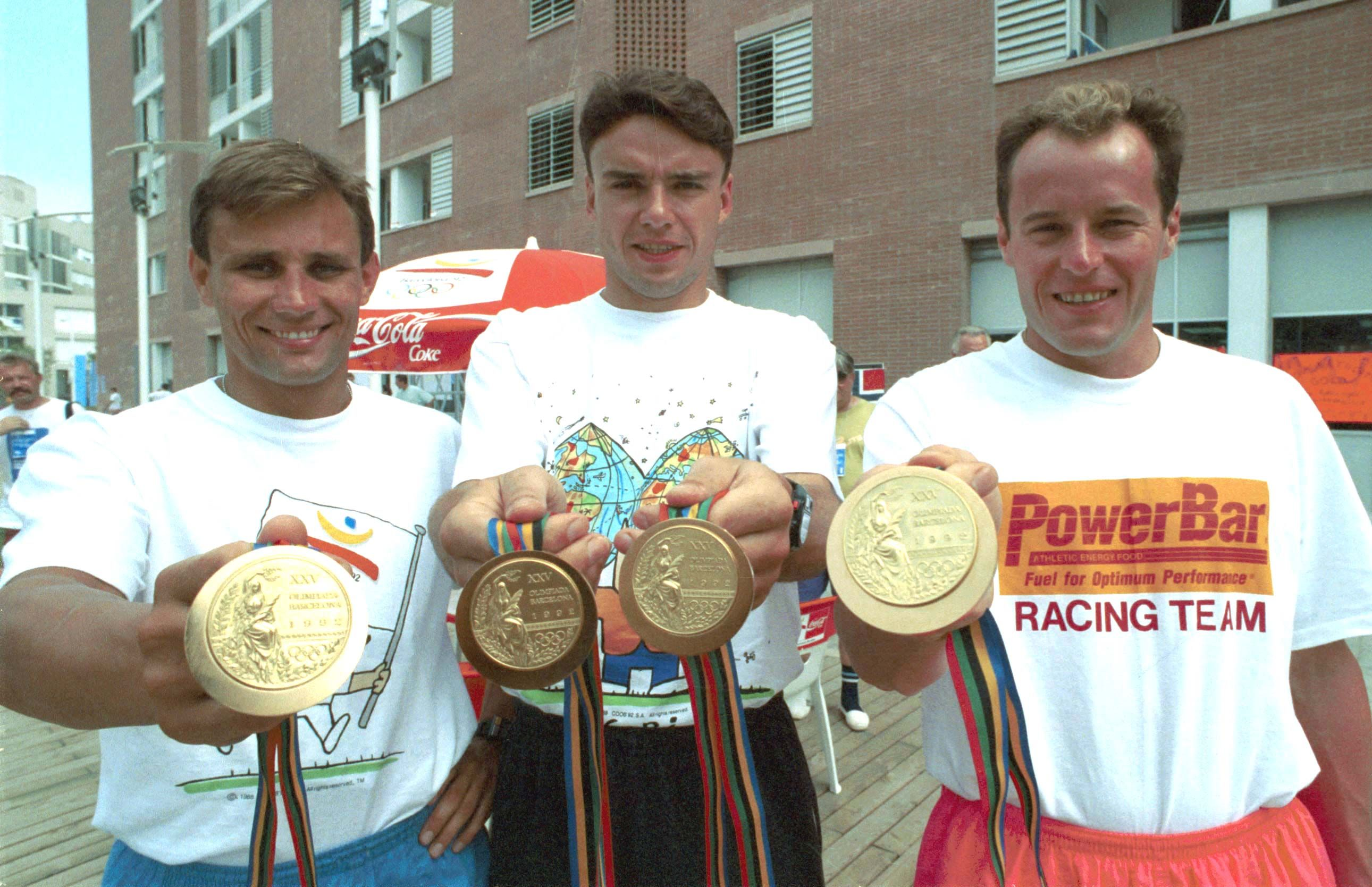 Dariusz Goździak, Arkadiusz Skrzypaszek, Maciej Czyżowicz. 1992 Summer Olympics.